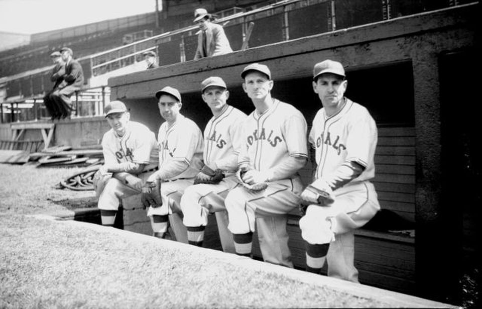 Au stade DeLorimier de Montréal, nous voyons quatre joueurs de l'équipe de baseball Royals assis sur le banc des joueurs. Ces joueurs sont identifiés comme étant Porter, Weathurell, Hooks et Harris.